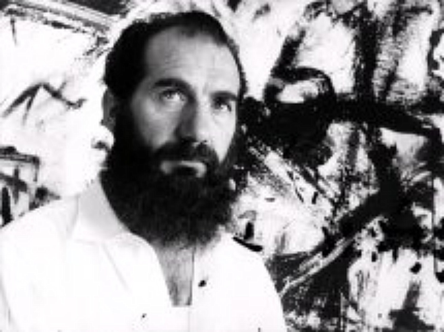 Vèneto: Emilio Vedova